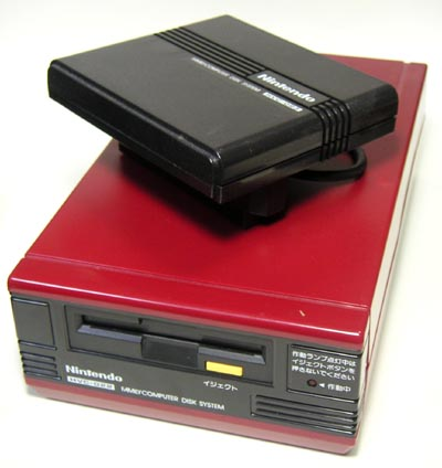 ファミリーコンピュータディスクシステム外観。